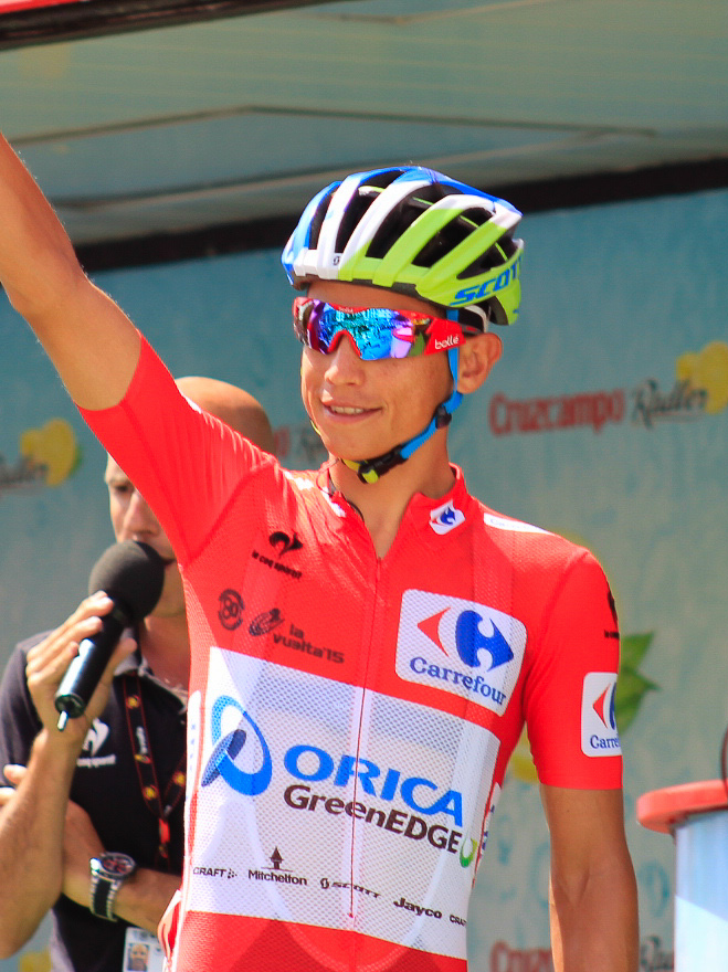 Vuelta a España 2015 | 8ª Etapa Puebla de Don Fadrique - Murcia-15